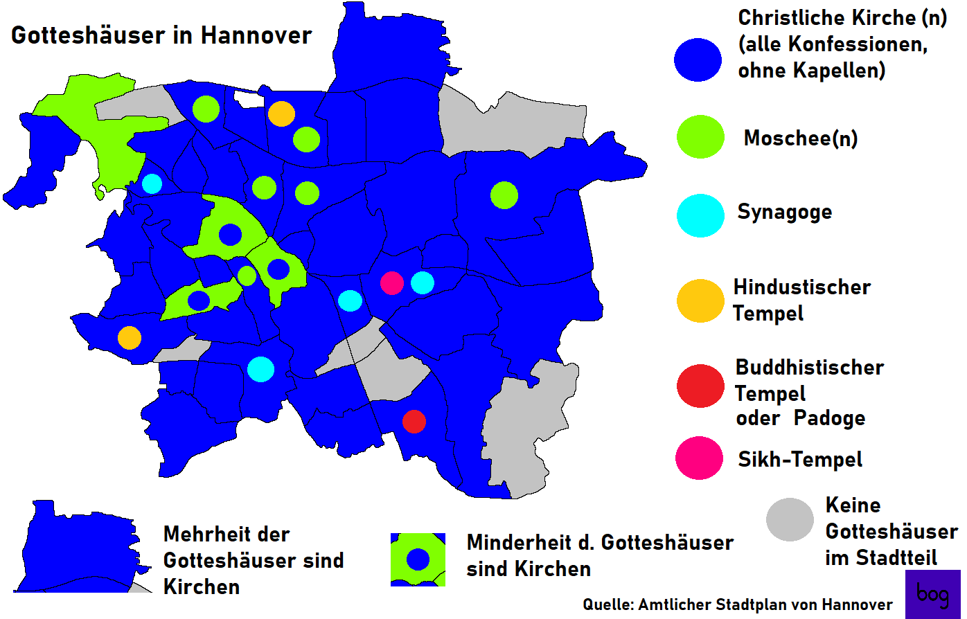 Gotteshäuser in Hannover nach Stadtteile